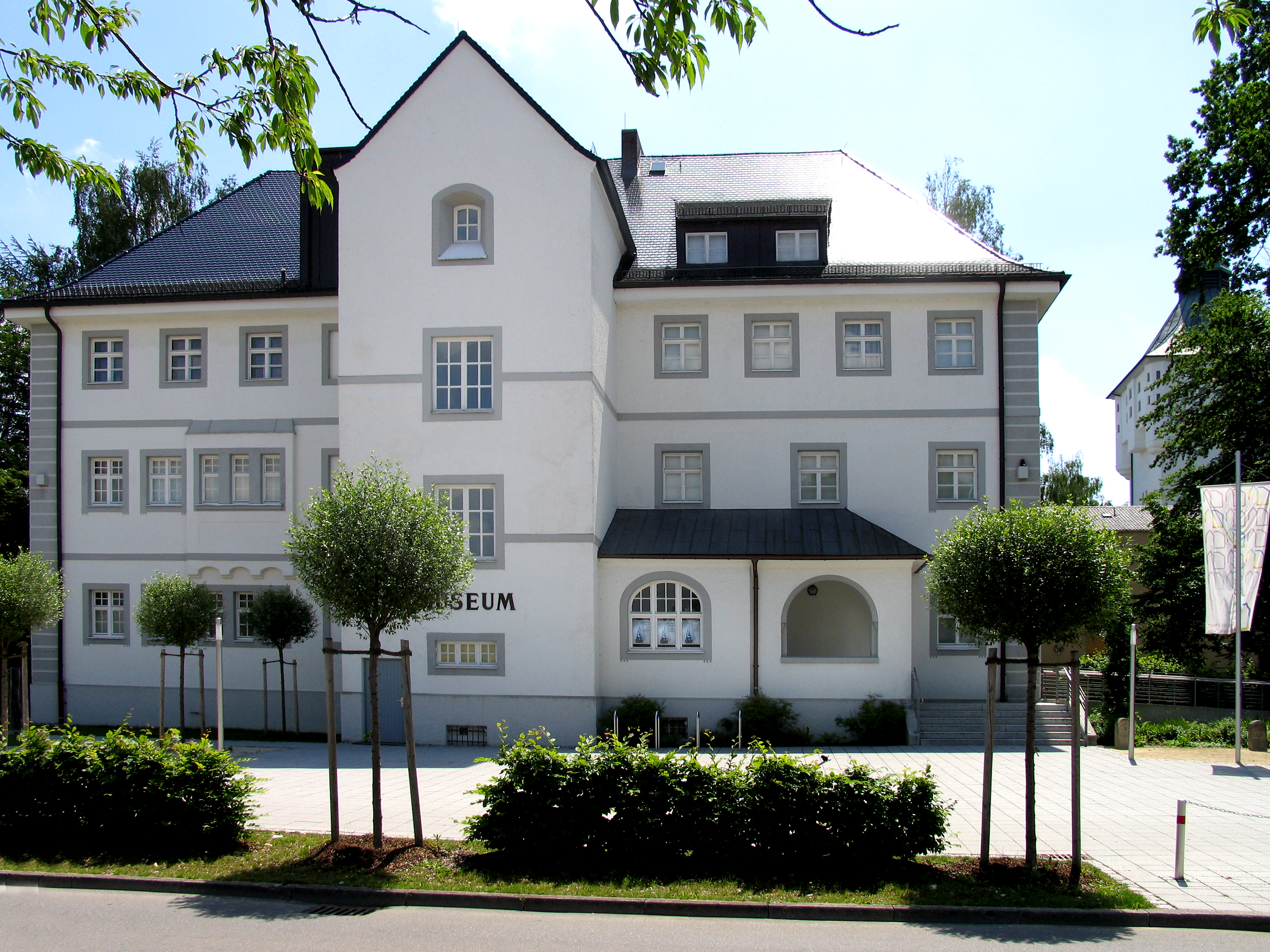 Museum und Galerie der Stadt Schwabmünchen